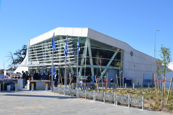 תחנת שדרות ביום הפתיחה